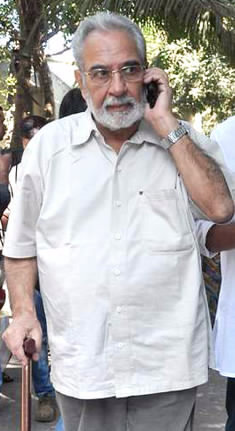 Kulbhushan Kharbanda at O P Dutta's funeral at Shivaji Park, Mumbai